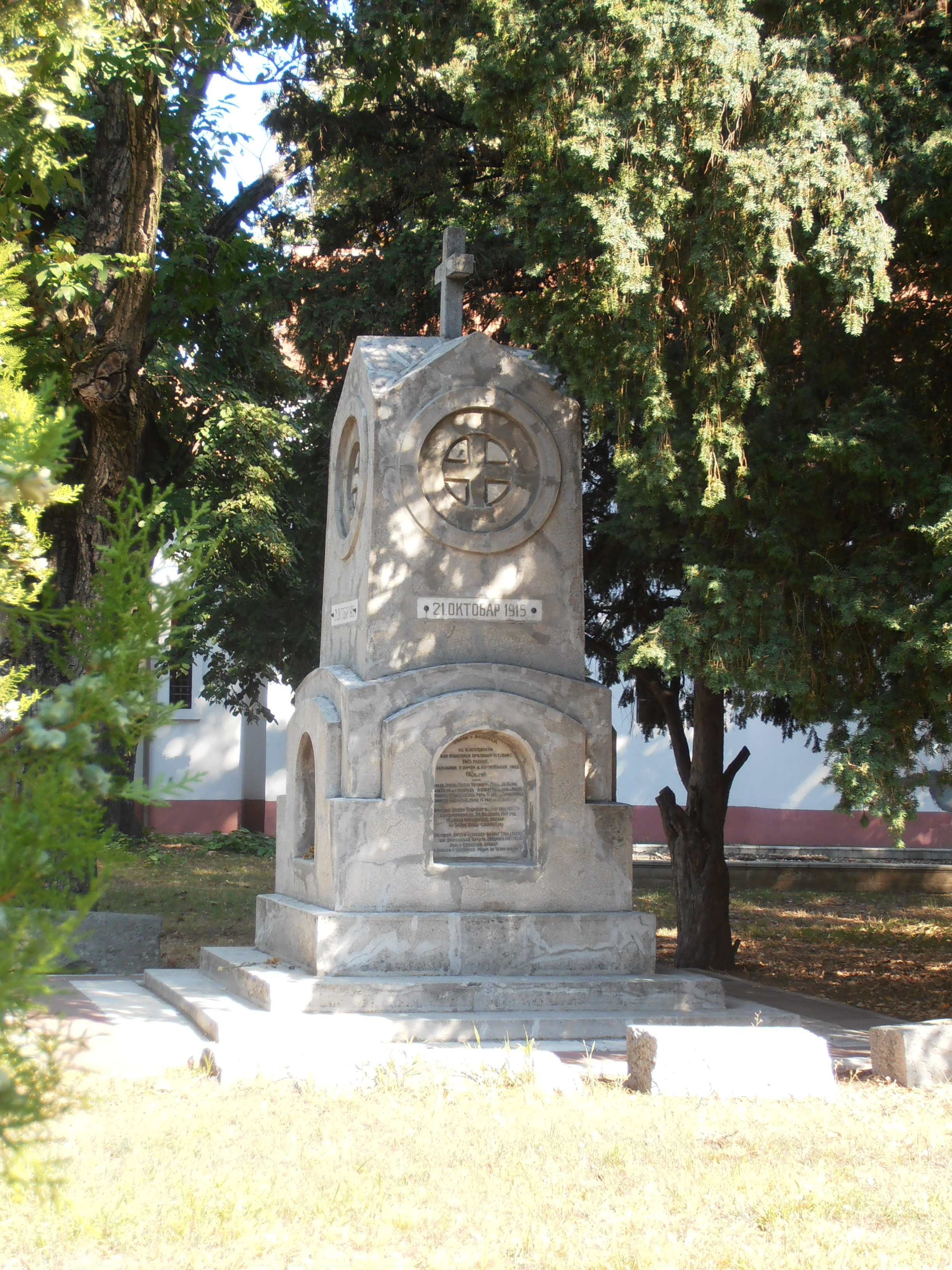 Стара црква у Јагодини (Храм Св.Архангела Михаила), споменик сахрањенима у Првом Светском рату.